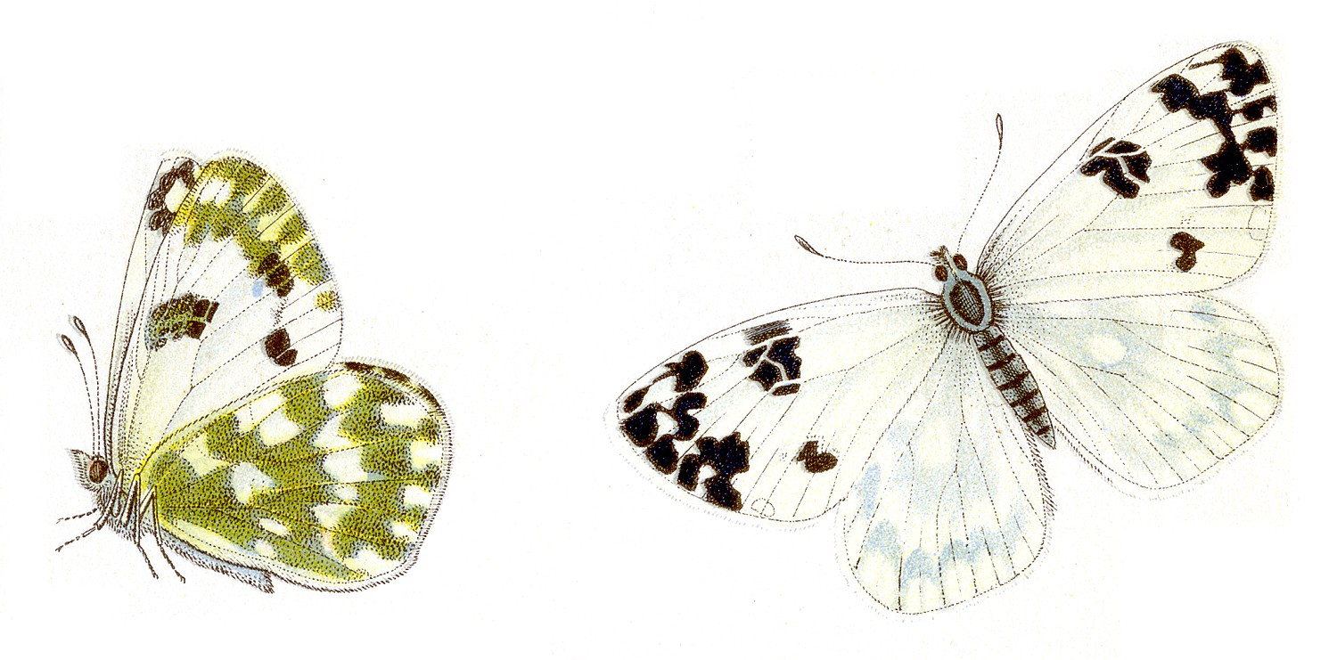 Pontia daplidice